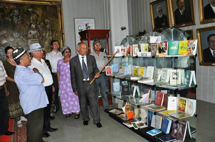 Музей академика Б. Гафурова, г. Гафуров, Согдийская область, Таджикистан.Тоҷикӣ: Осорхонаи академик Б. Ғафуров. ш. Ғафуров, вилояти Суғд,Тоҷикистон